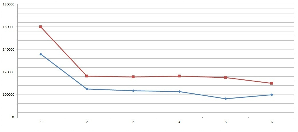 Demonstrativo da vendas obtidas pelas seis primeiras edições da revista Superman/Batman, onde foi publicado o arco de história "Inimigos Públicos"'. Em azul as vendas no mês de lançamento e em vermelho as vendas totais, segundos os dados fornecidos pela Diamond, empresa responsável pela distribuição das revistas nos Estados Unidos